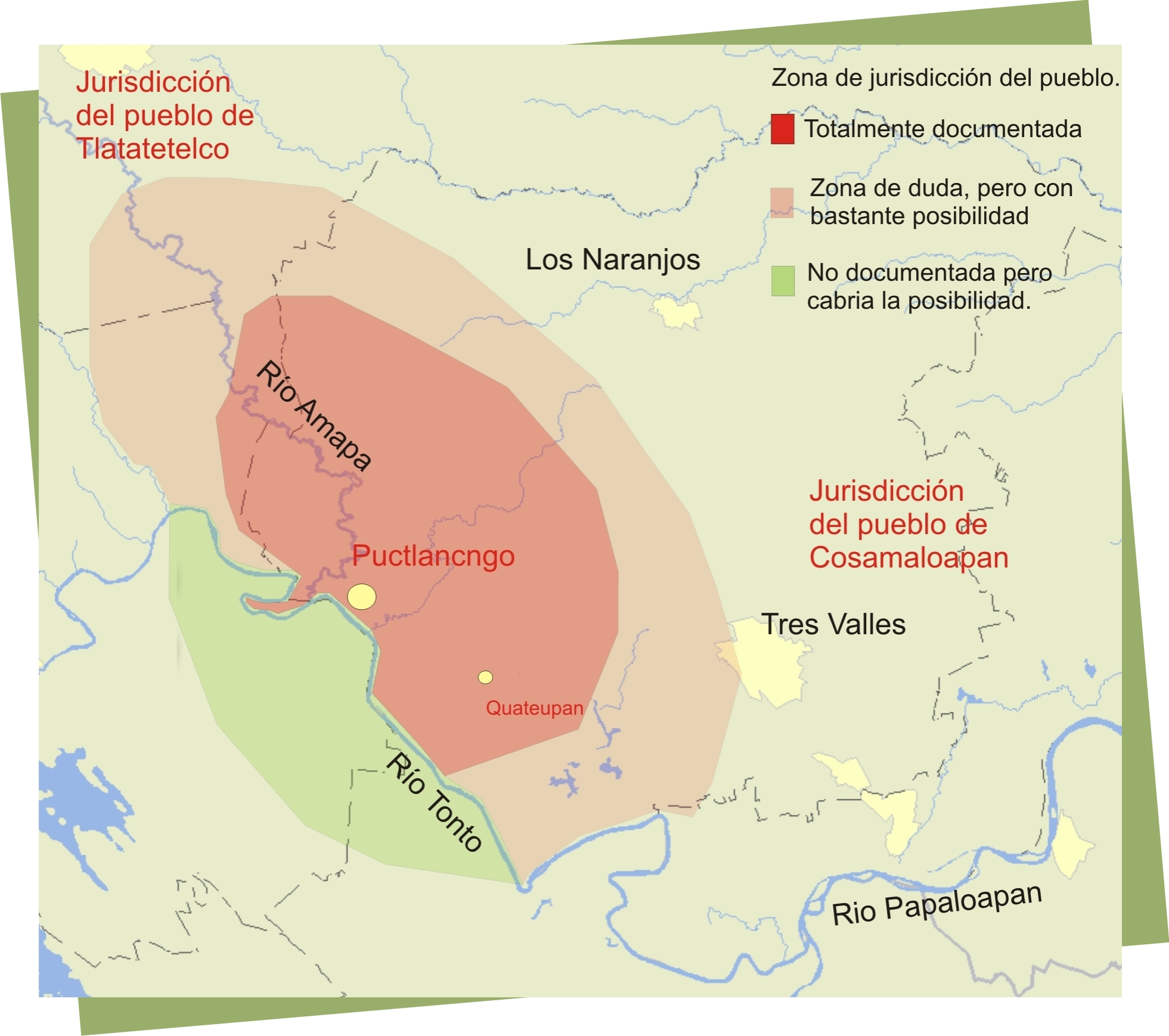 Territorio bajo jurisdicción del pueblo prehispánico de Puctlancingo, en al actual estado de Veracruz, México. Basado en mercedes otorgadas a finales del siglo XVI y principios del siglo XVII.